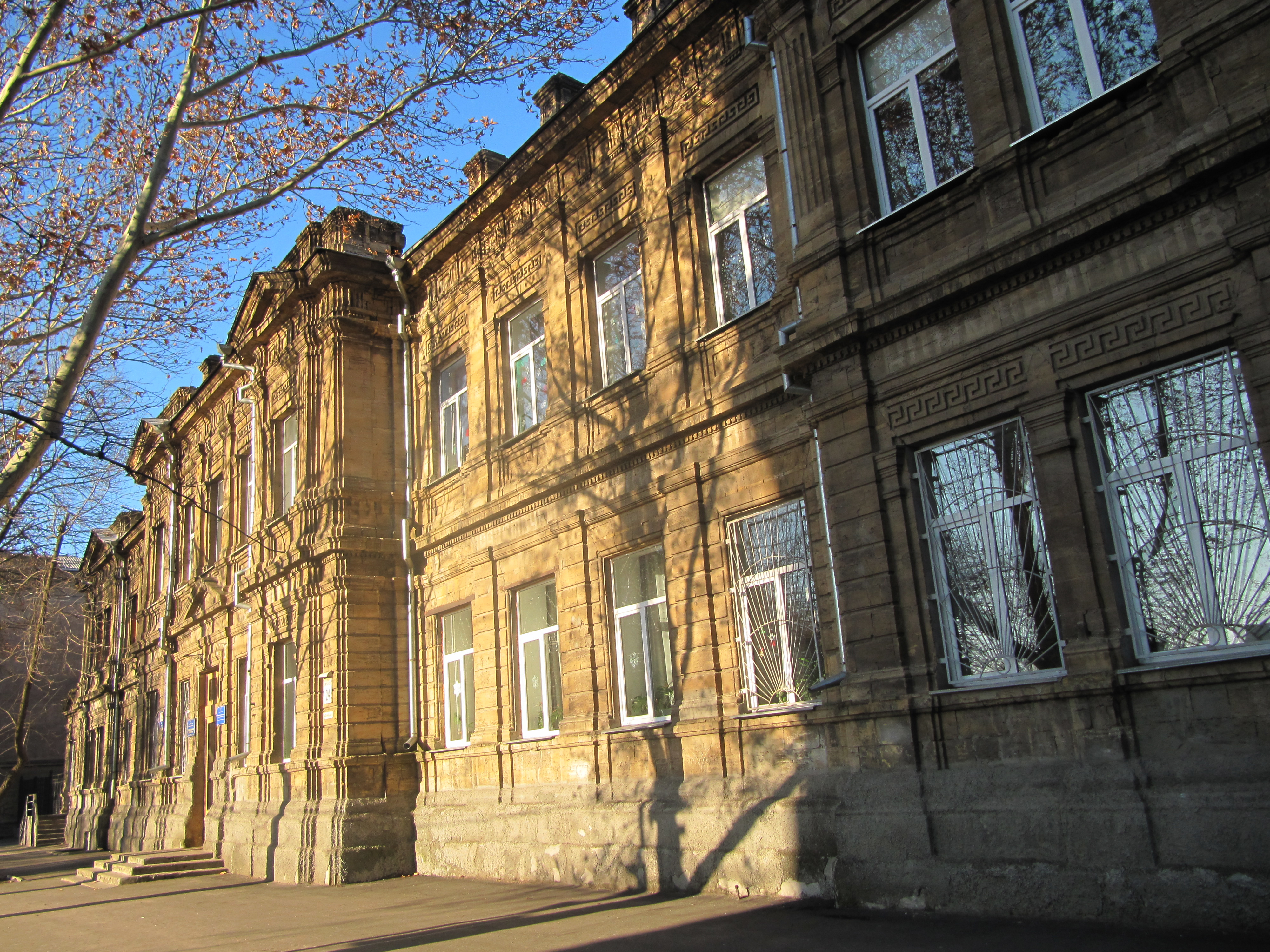 Друга жіноча гімназія (на розі вулиць Адміральської та Малої Морської) Миколаївська весна у Вікіпедії